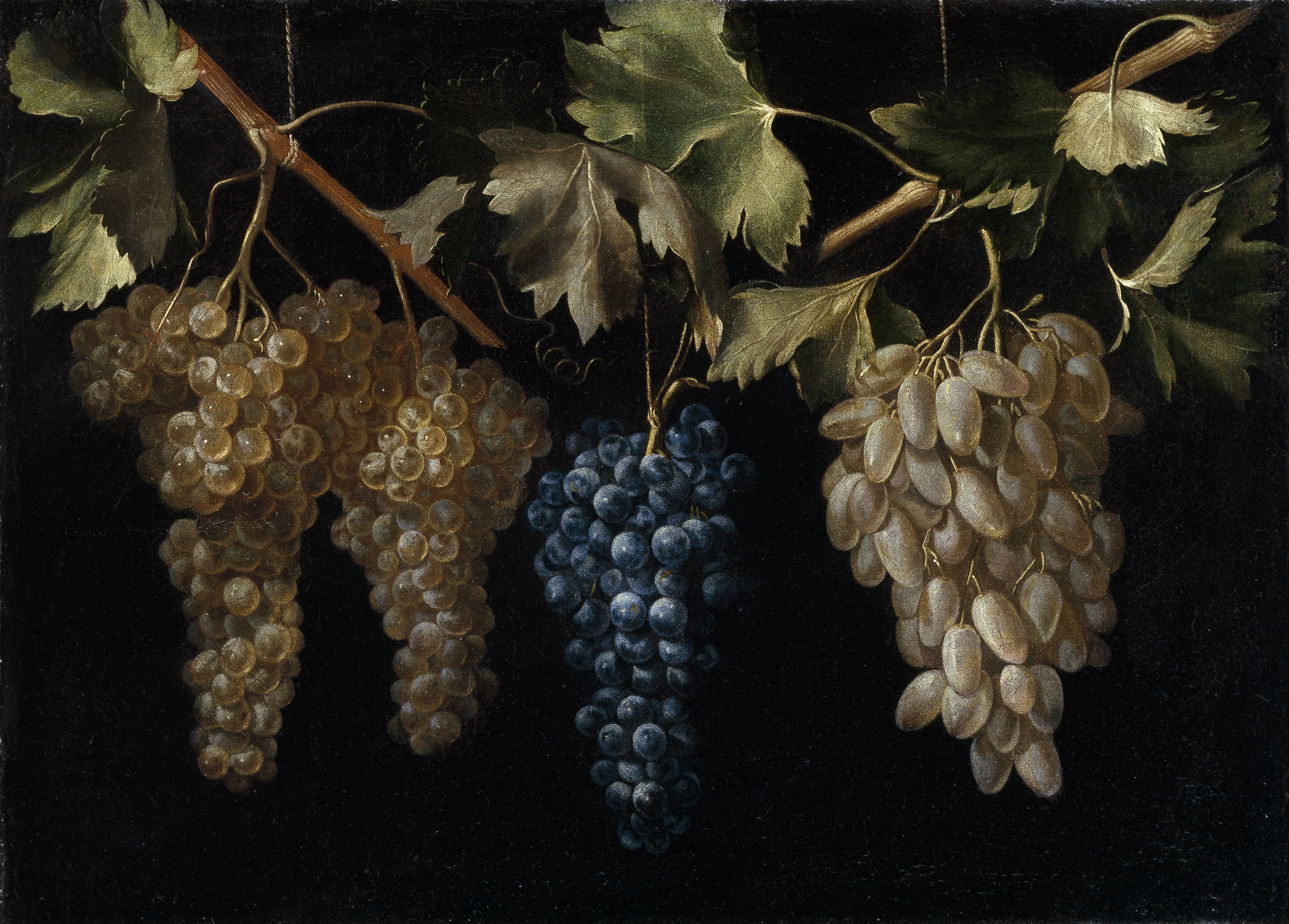 Cuatro racimos de uvas colgando, óleo sobre lienzo, 45 x 61 cm, Madrid, Museo del Prado